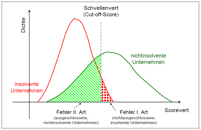 Klassifizierungsfehler in Abhängigkeit vom gewählten Schwellenwert und den Scoredichtefunktionen für insolvente und nichtinsolvente Unternehmen Abbildung aus BEMMANN, M. (2005): "Verbesserung der Vergleichbarkeit von Schätzgüteergebnissen von Insolvenzprognosestudien",in Dresden Discussion Paper Series in Economics 08/ 2005, (8.11.2006), 2005, S. 10)